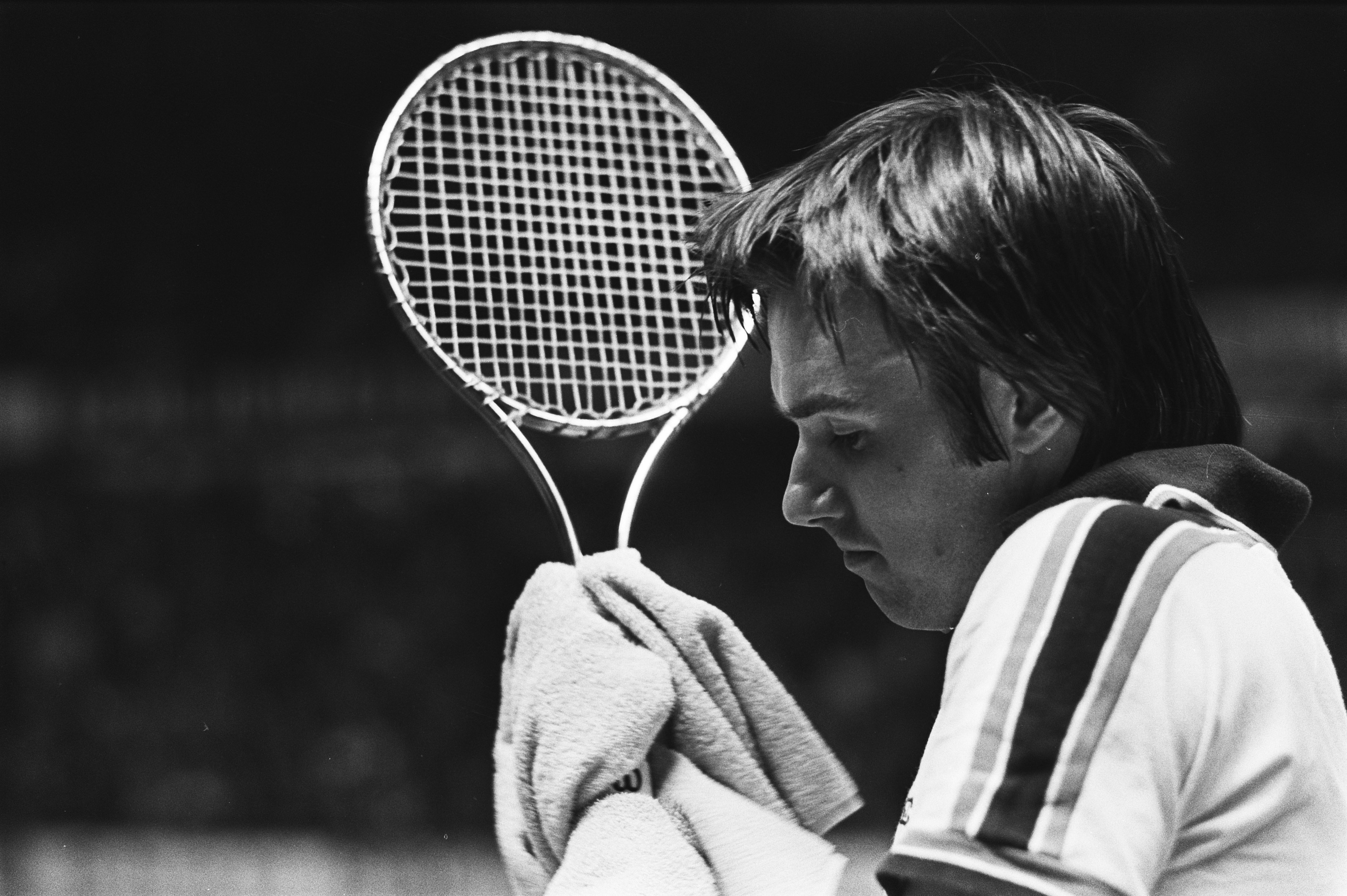 Collectie / Archief : Fotocollectie Anefo Reportage / Serie : [ onbekend ] Beschrijving : ABN-tennistoernooi in Rotterdam; Jimmy Corners in actie (kop) Datum : 5 april 1978 Locatie : Rotterdam, Zuid-Holland Trefwoorden : tennis Instellingsnaam : ABN Fotograaf : Suyk, Koen / Anefo Auteursrechthebbende : Nationaal Archief Materiaalsoort : Negatief (zwart/wit) Nummer archiefinventaris : bekijk toegang 2.24.01.05 Bestanddeelnummer : 929-6576